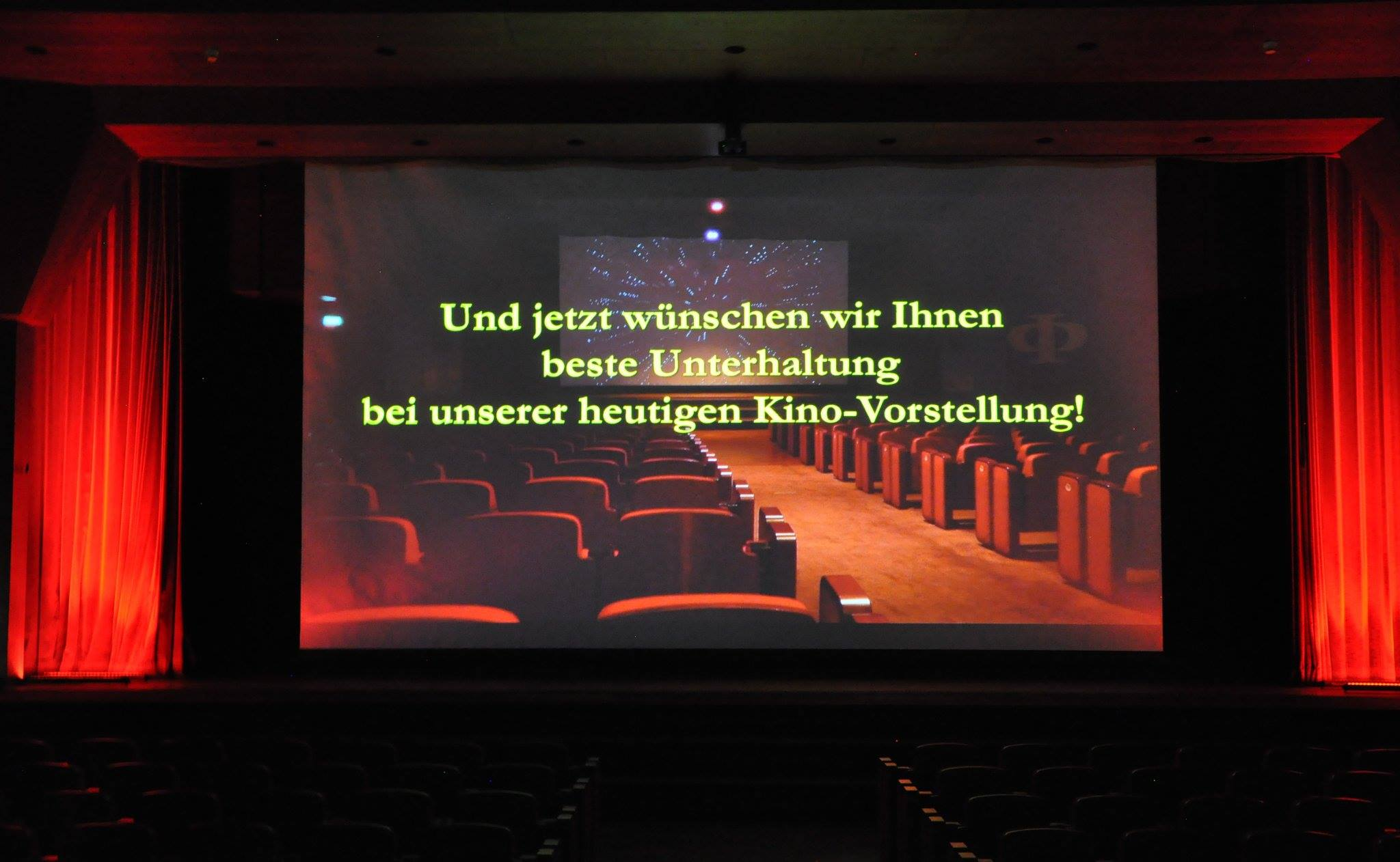 Der Theatersaal im Augustinum Heidelberg, hier mit heruntergefahrener Leinwand